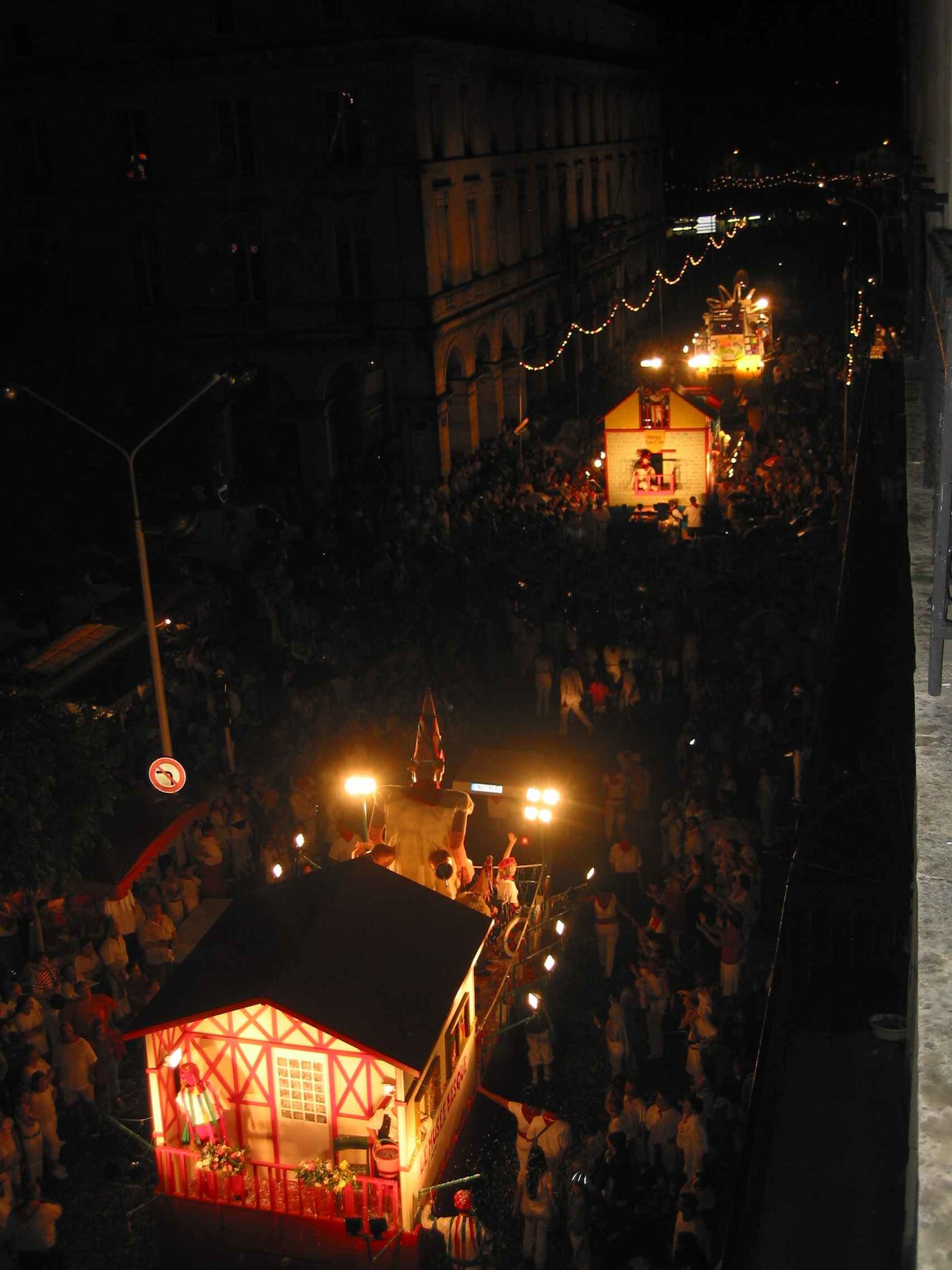 Fêtes de Bayonne 2004, le corso lumineux. Photo prise le 09/08/04 par Harrieta171